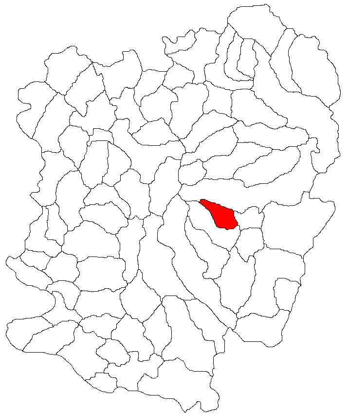 Categorie:Hărţi ale judeţului Caraş-Severin